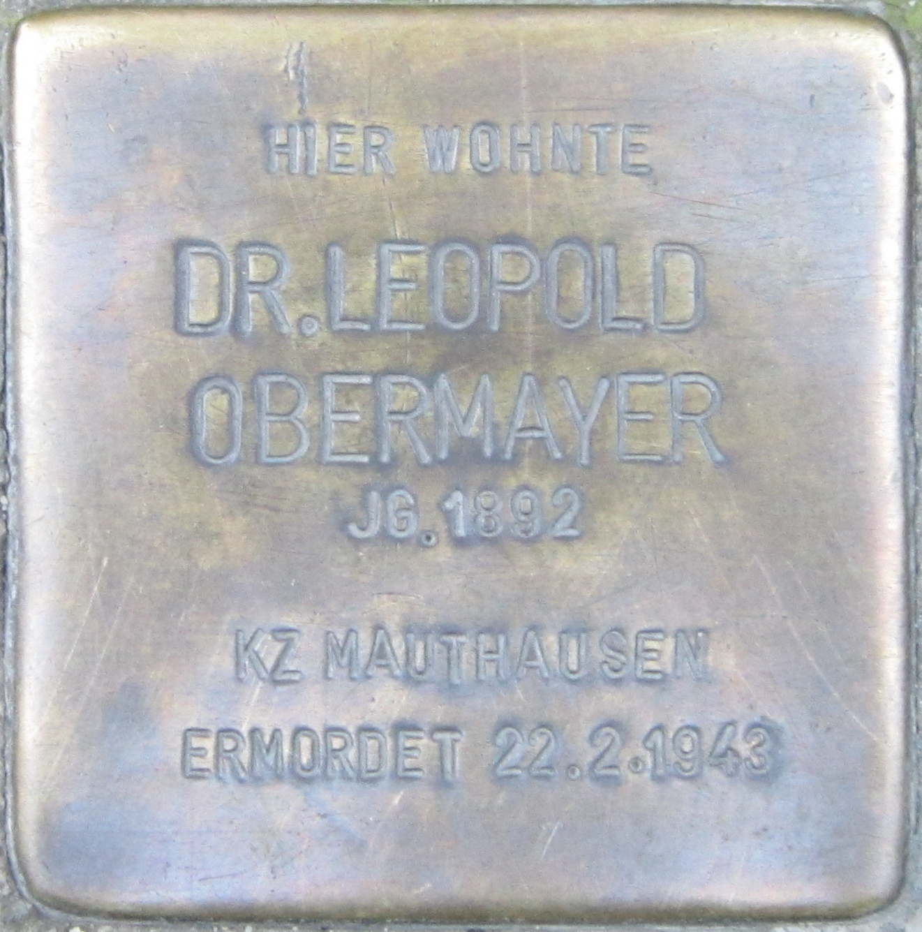 Wolframstraße 1, Würzburg, Germany Hier wohnte Dr. Leopold Obermayer, Jg. 1892, KZ Mauthausen, ermordet 22.2.1943